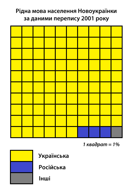 Інфографіка розподілу населення міста Новоукраїнка за рідною мовою згідно з даними перепису 2001 року. Джерело: Розподіл населення Кіровоградської області за рідною мовою (у % до загальної чисельності населення) за переписом 2001 року